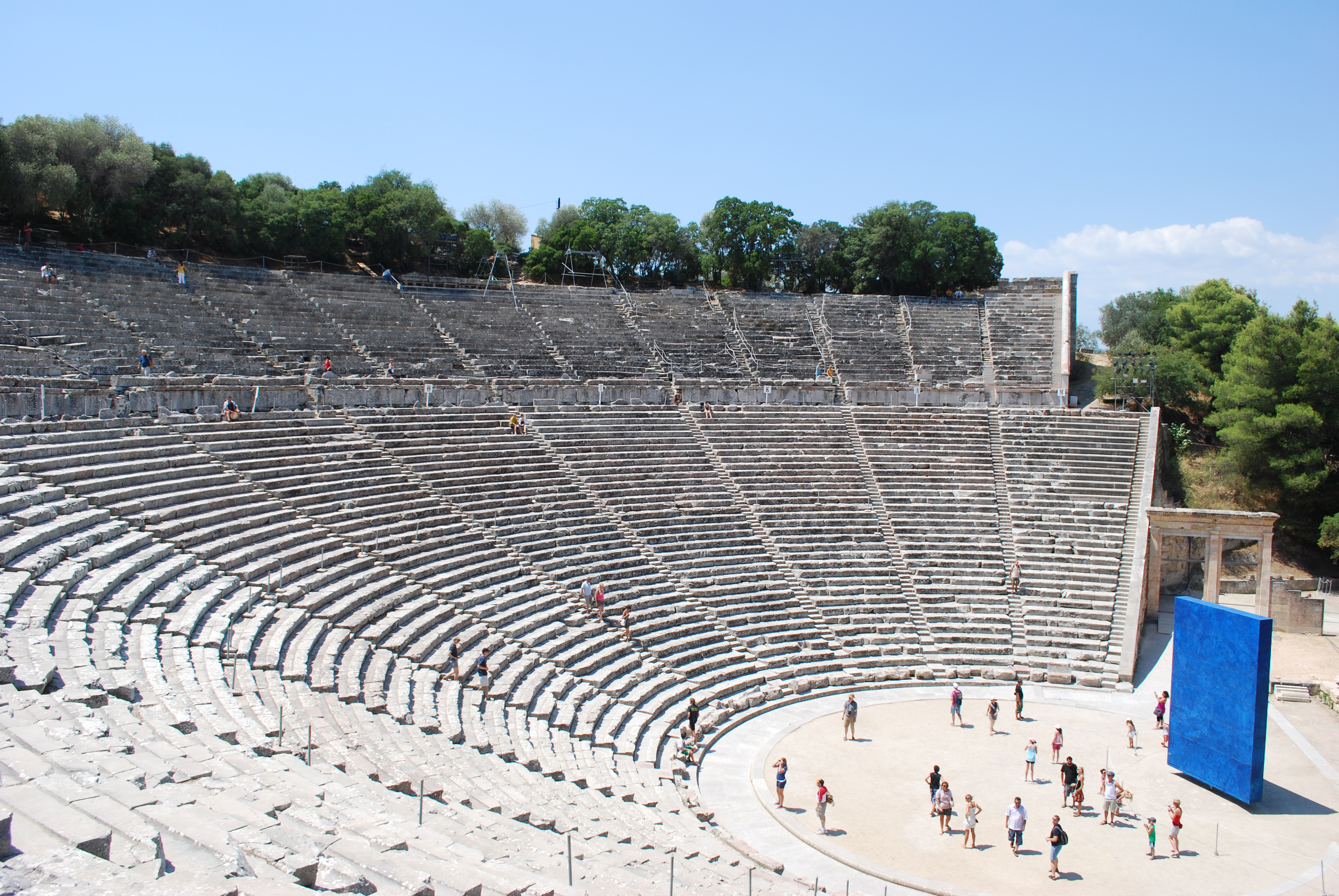 Vue du théâtre d'Epidaure.